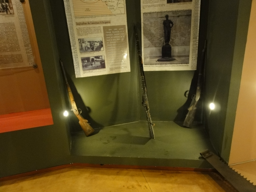 Des armes utilisées par les colons, musée des civilisation de Dschang